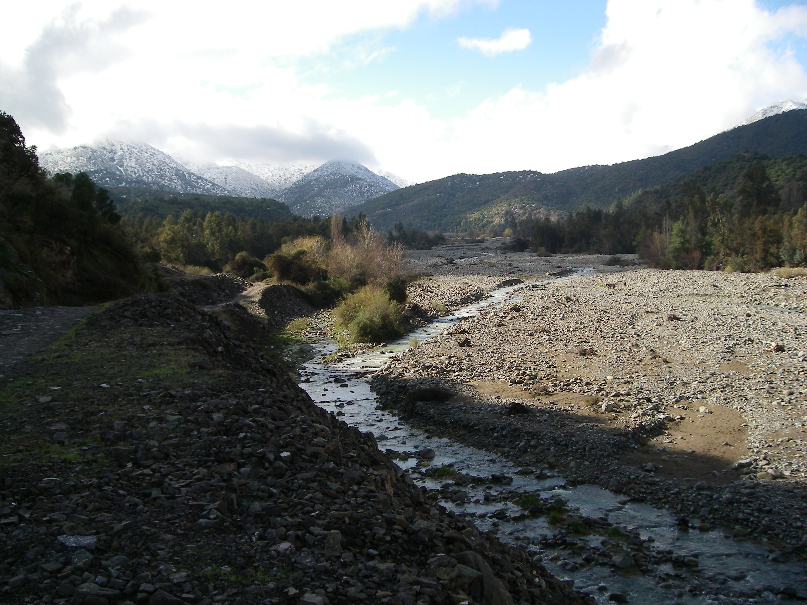 Río Codegua.